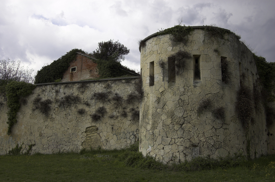 Parte rivolta verso Verona del castel San Felice